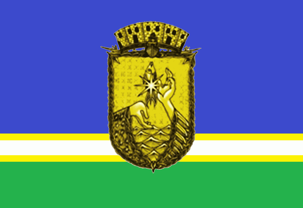 Bandeira de São Gabriel da Cachoeira - Amazonas, Brasil.